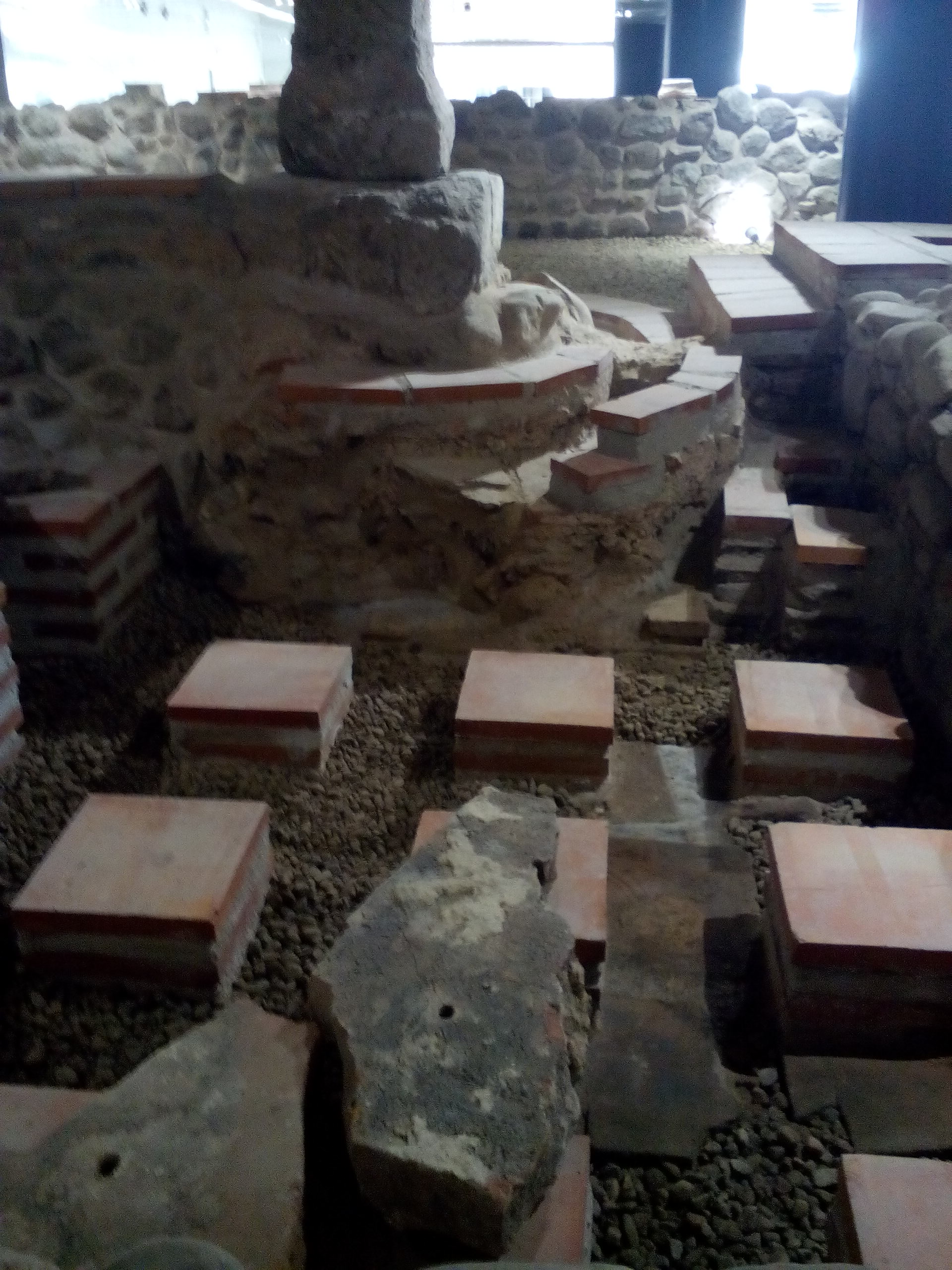 част от пространство на античен културно-комуникационен комплекс Сердика